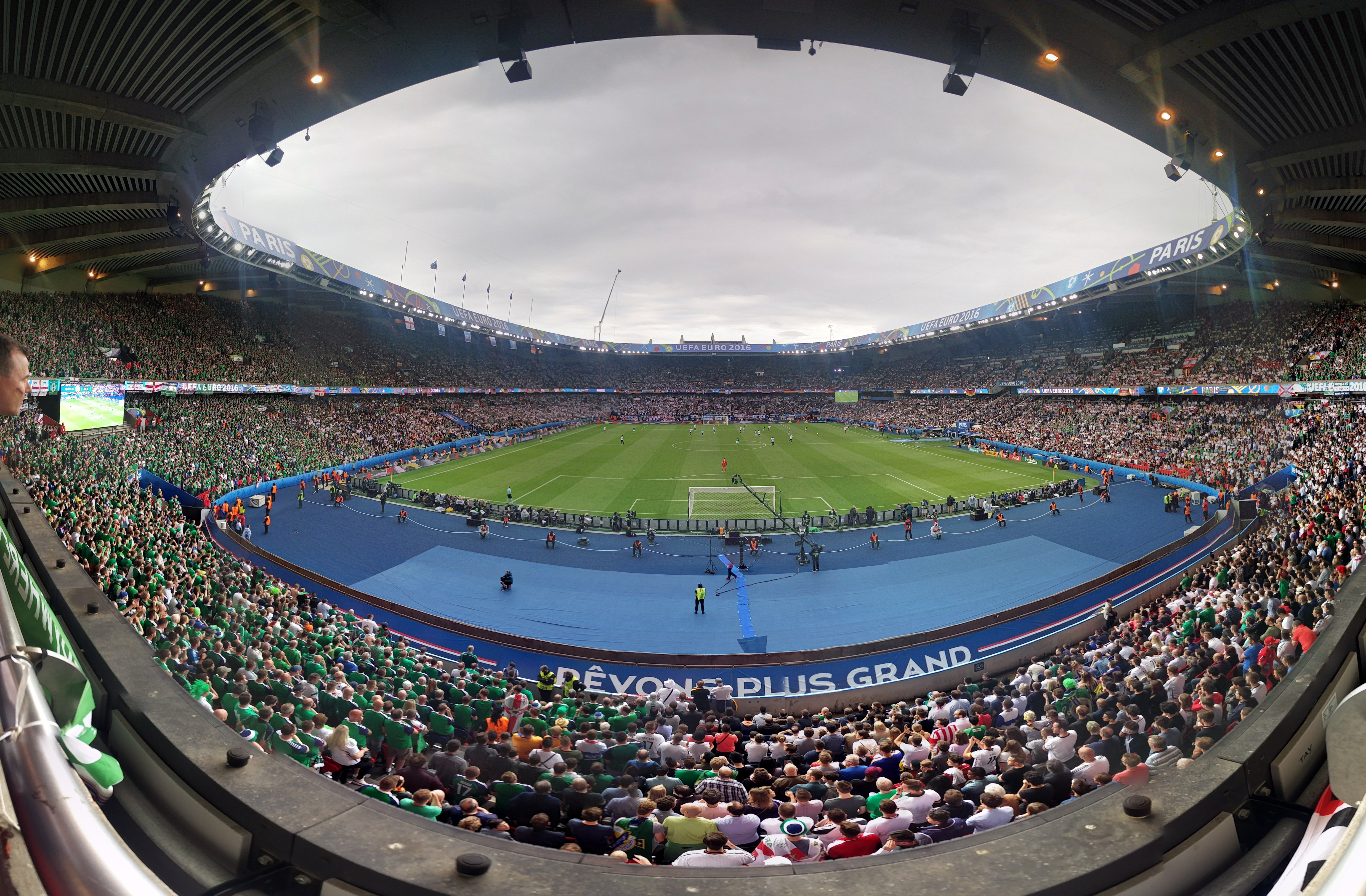 Le Parc des Princes durant l'Euro 2016, match Irlande du Nord - Allemagne